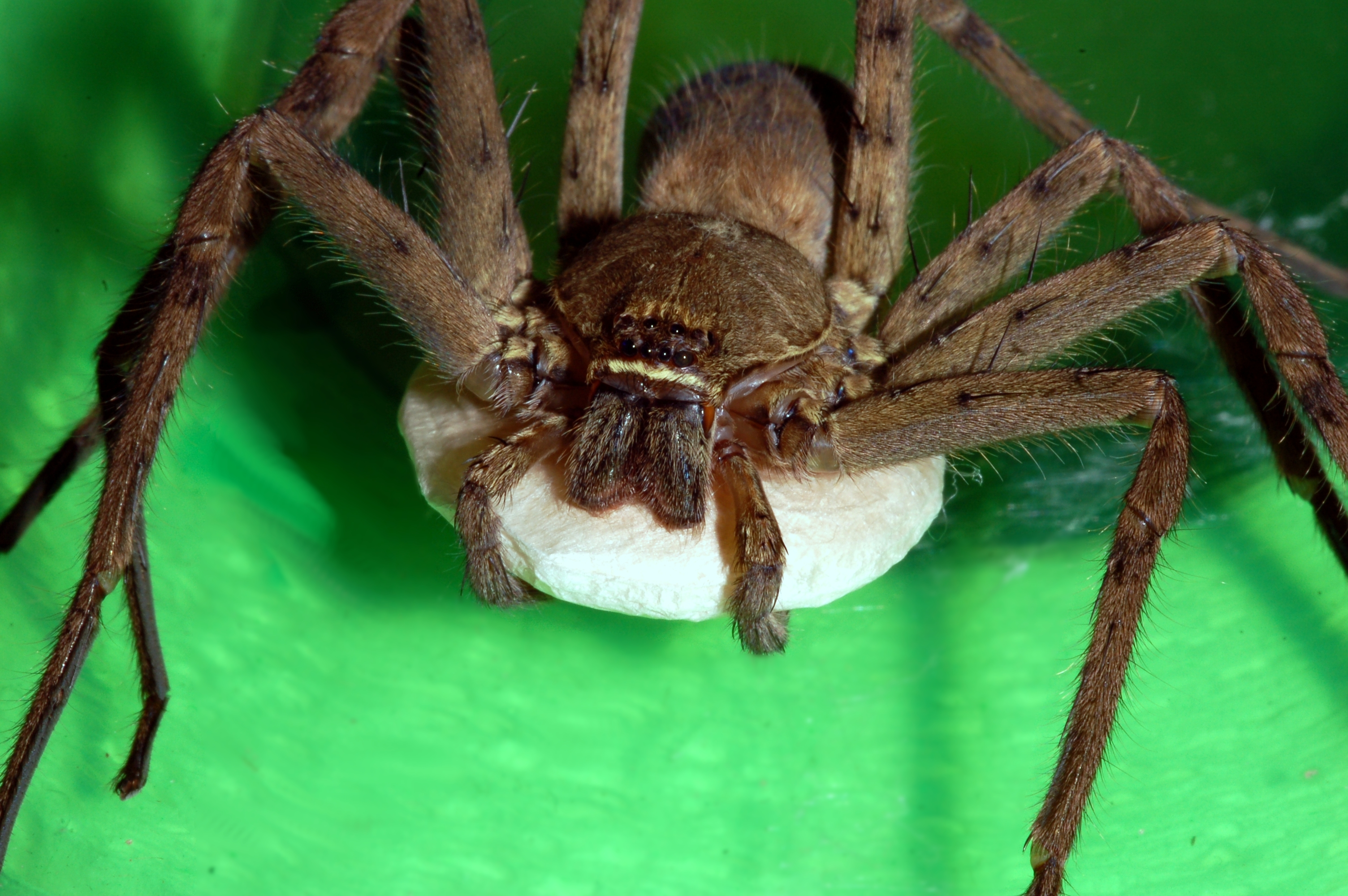 Riesenkrabbenspinne Heteropoda venatoria (Fam. Sparassidae) in Gefangenschaft, Museum Wiesbaden, Deutschland